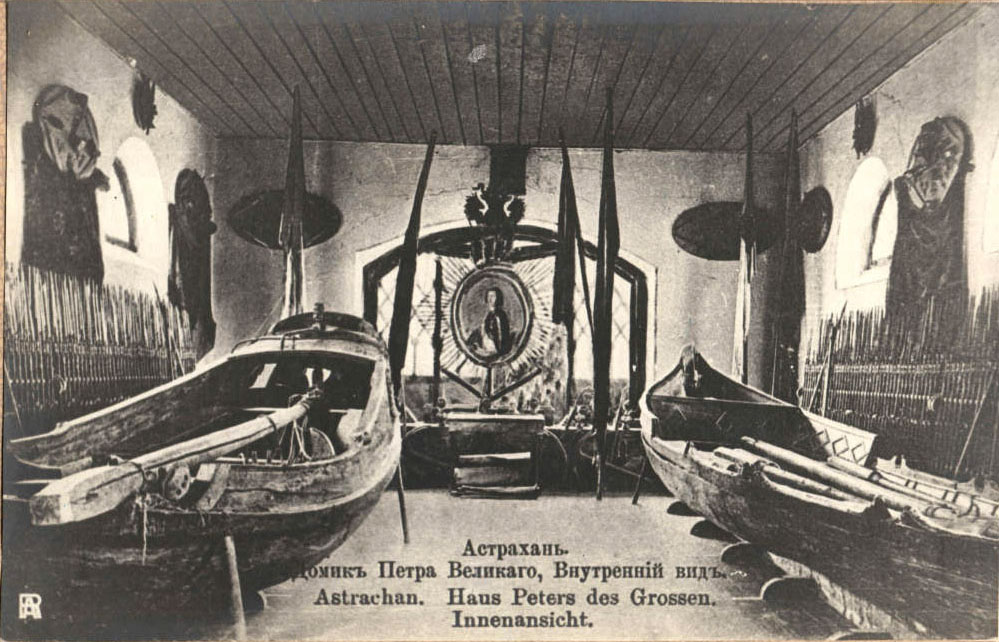 Астрахань. Внутренний вид домика Петра I